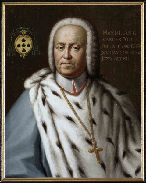 Portret van Maximilianus Antonius van der Noot (°Brussel 27 december1685-+27 september 1770) vijftiende bisschop, inv nr: 499/15